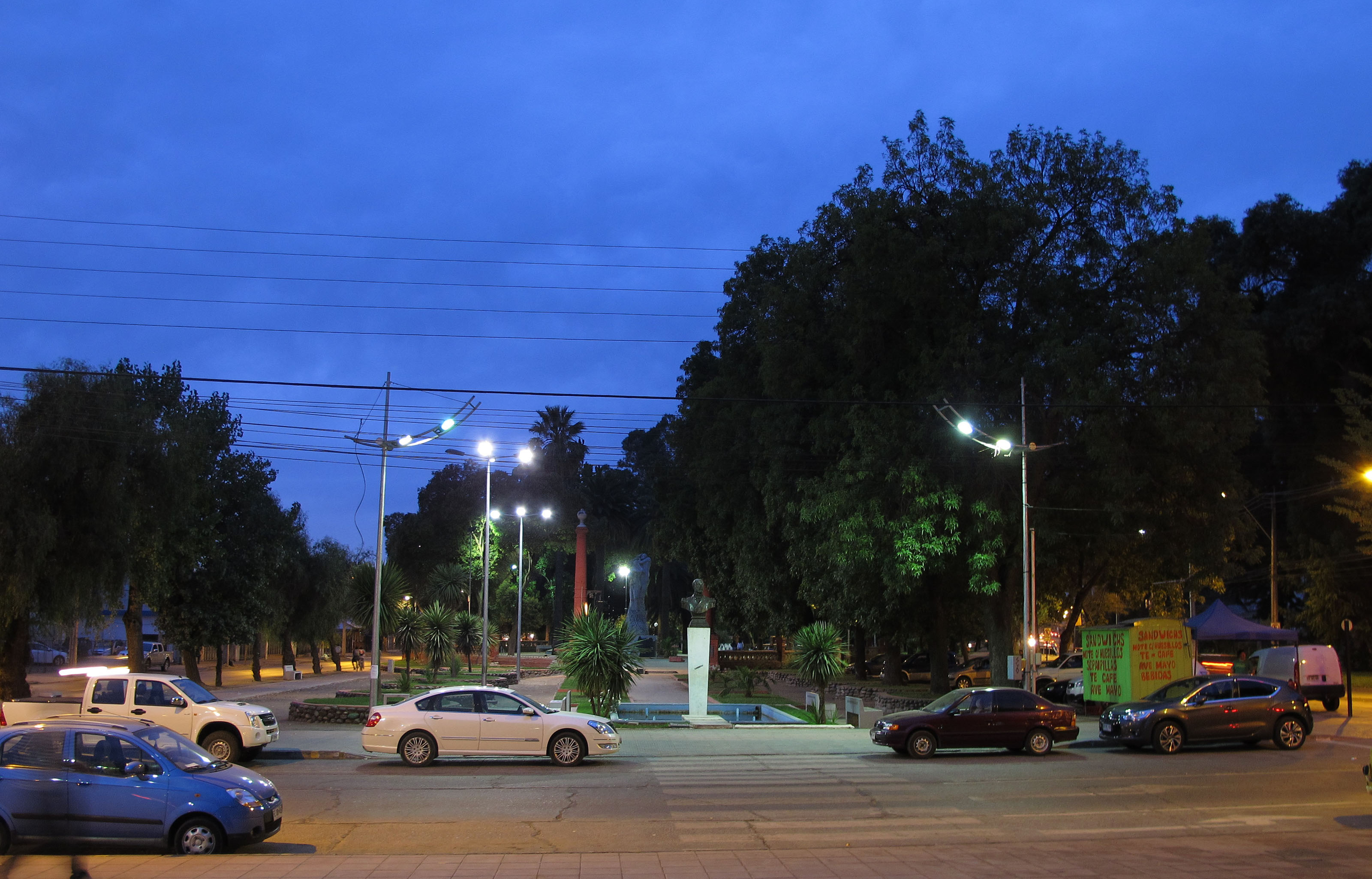 Alameda